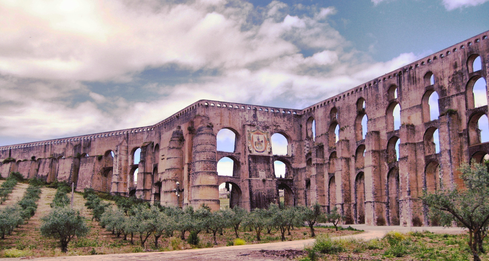 ELVAS